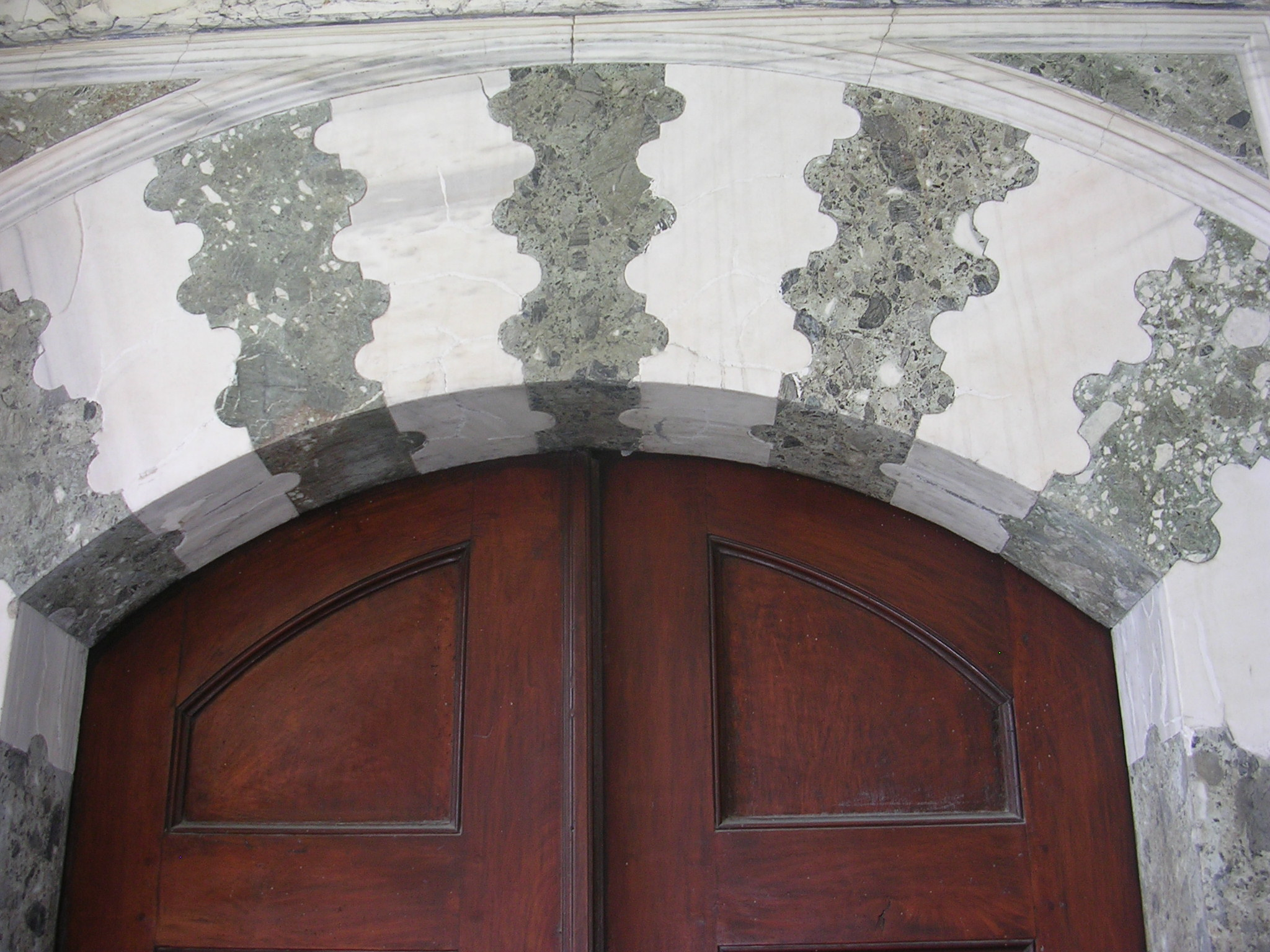 Topkapi Sarayinda bir kemer, Istanbul, Turkiye